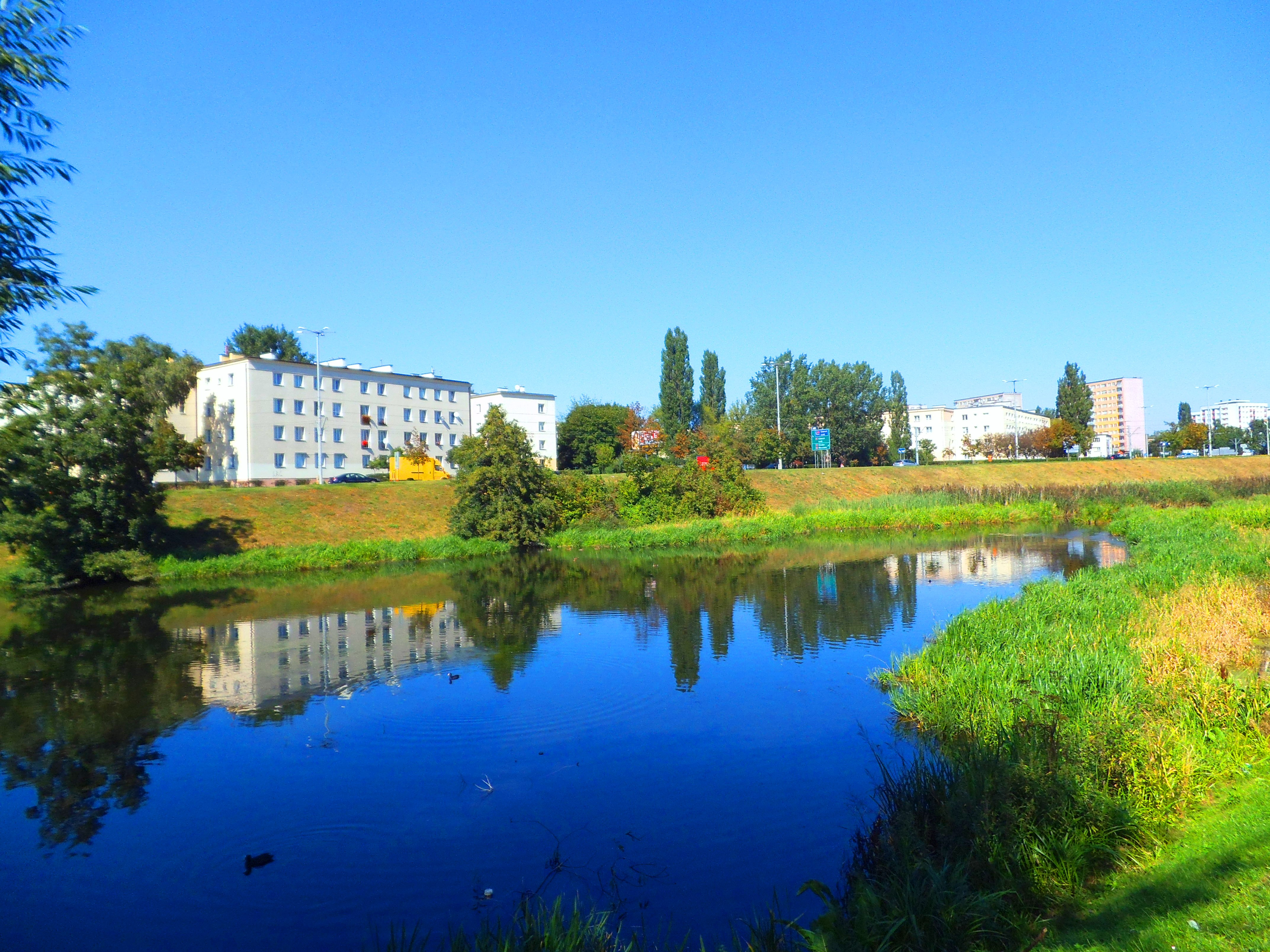 Staw Kaszownik w Toruniu.